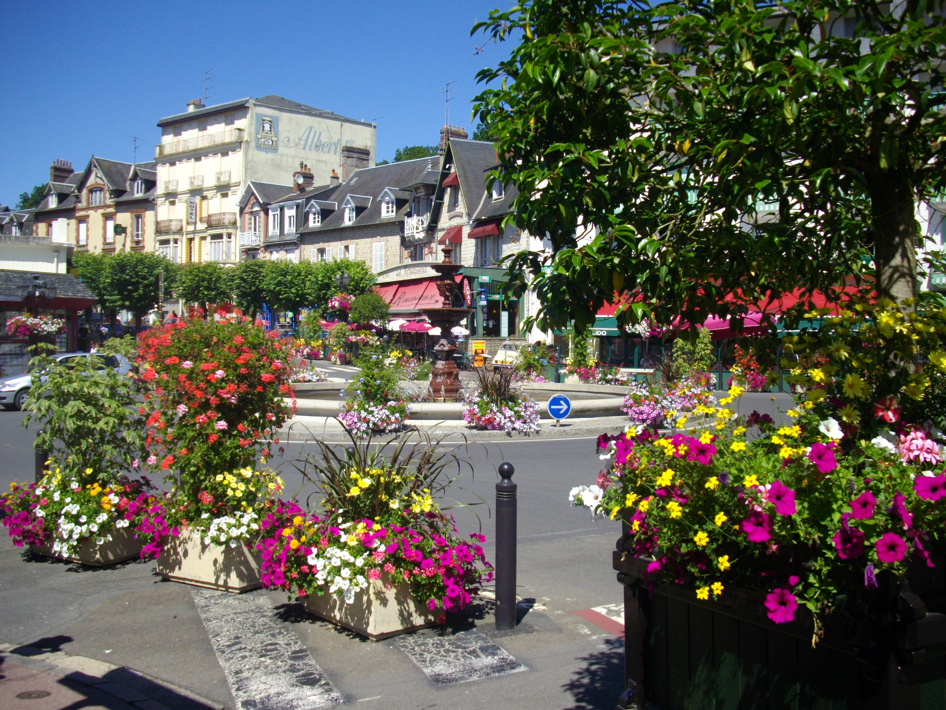 Centre-ville de Bagnoles-de-l'Orne (Basse-Normandie, France)